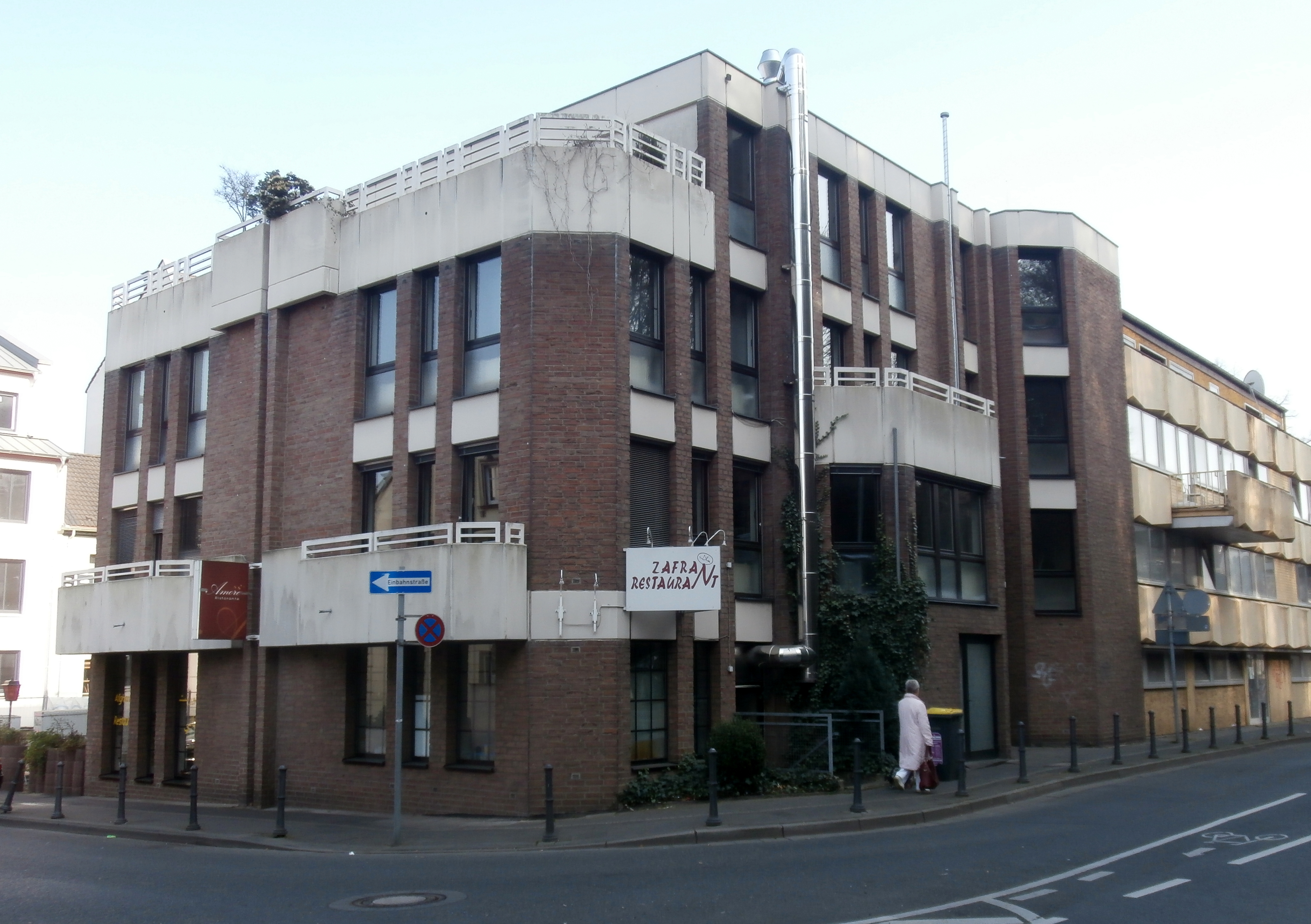 Außenstelle der Botschaft der Kirgisischen Republik, Aennchenstraße 61, Bad Godesberg